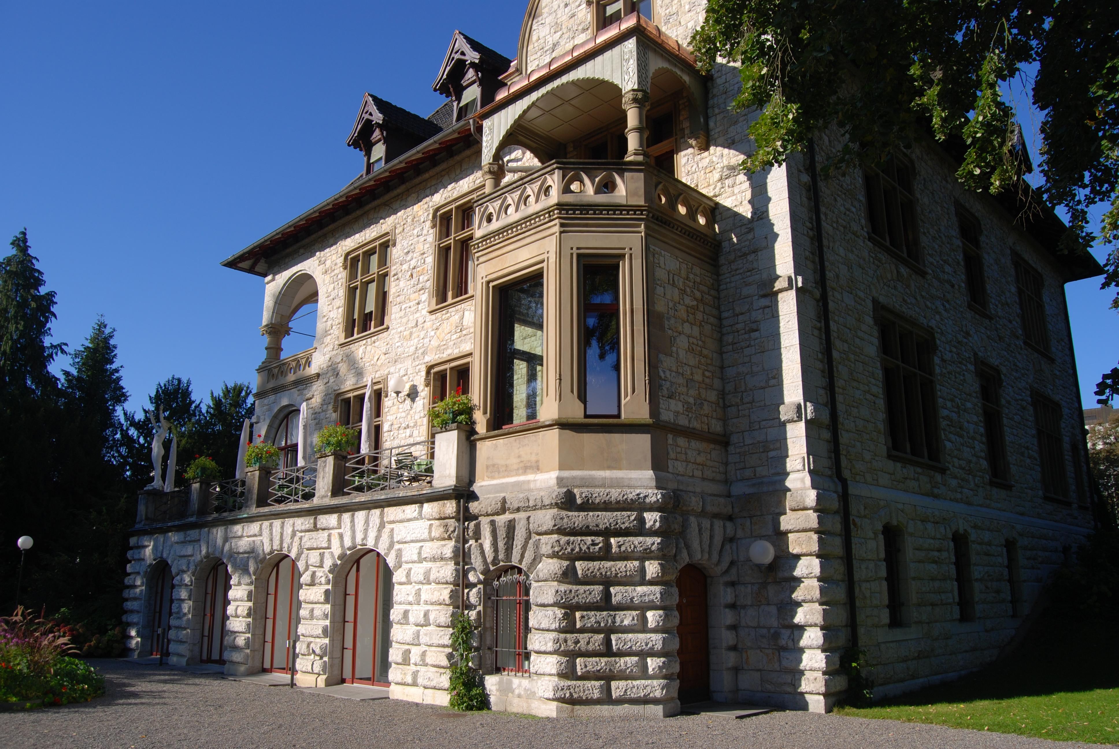 Villa Boveri (seit 1943 Clubhaus BBC/ABB) mit Gartensaal und Badehaus, KGS_Nr = 53. 5 Laendliweg, Baden (AG). 665.529 / 258.070. Kategorie: A. Objektart: Wohnbauten und ihre Nebenanlagen. Villen, Landhaeuser. Koordinaten N 47.47013 E 8.30795.